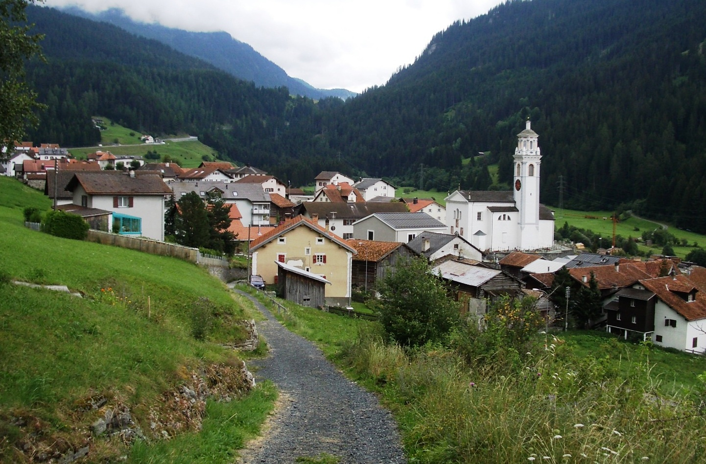 Tinizong GR, Switzerland